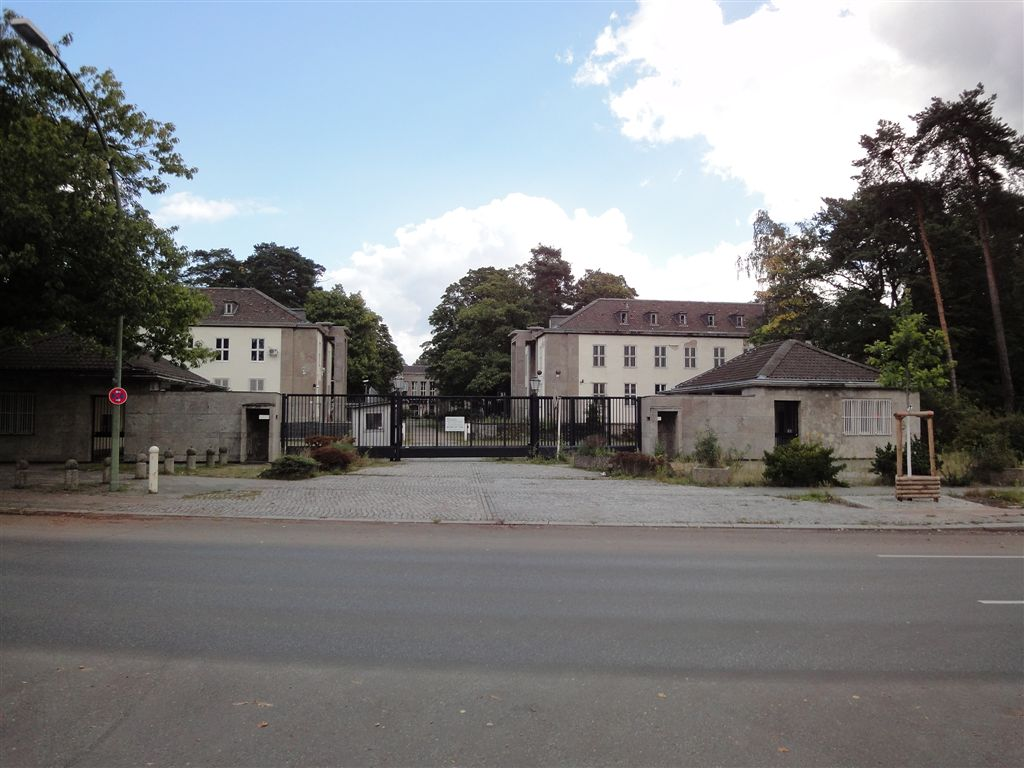 Berlin-Dahlem, ehem. US-Hauptquartier (jetzt Wohnanlage The Metropolitan Gardens). Hauptzufahrt an der Clayallee.